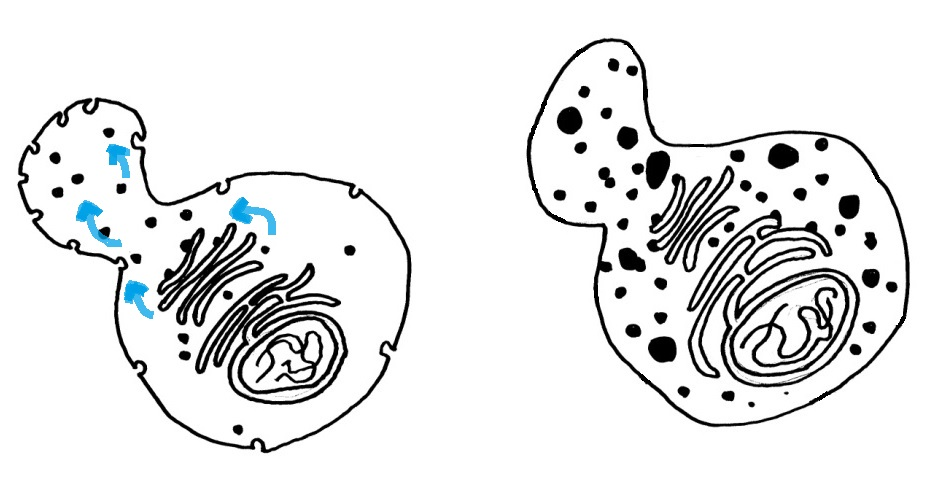 한국어 (조선): 정상 효모와 돌연변의 효모의 비교